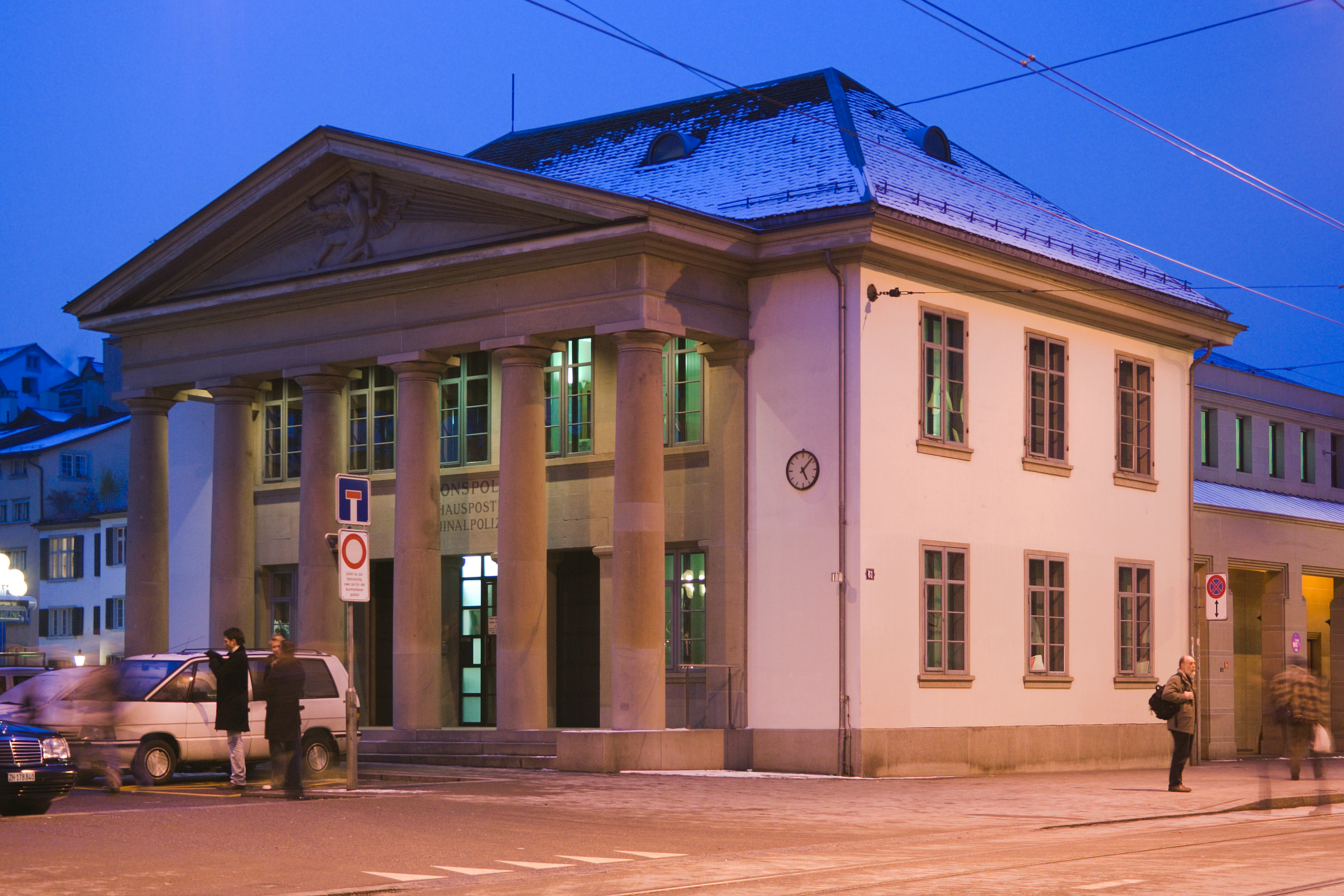 Hauptwache Rathausbrücke, Zürich, SchweizErbaut von Hans Conrad Stadler.